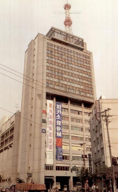 1982년 문화방송-경향신문 본사 건물.